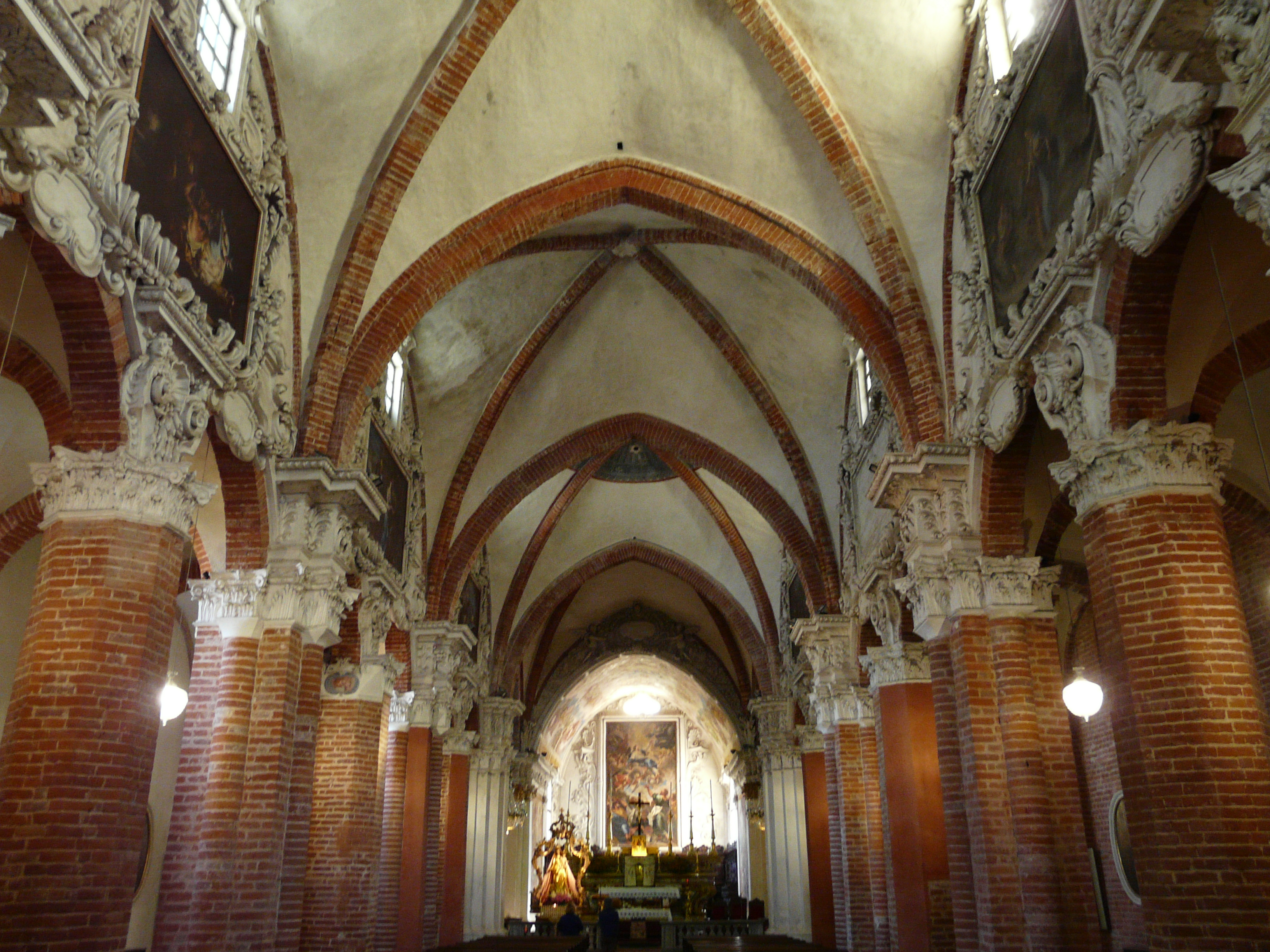 Navata centrale dall'ingresso dell'abbazia di Santa Maria di Casanova, frazione di Casanova, Carmagnola, Piemonte, Italia